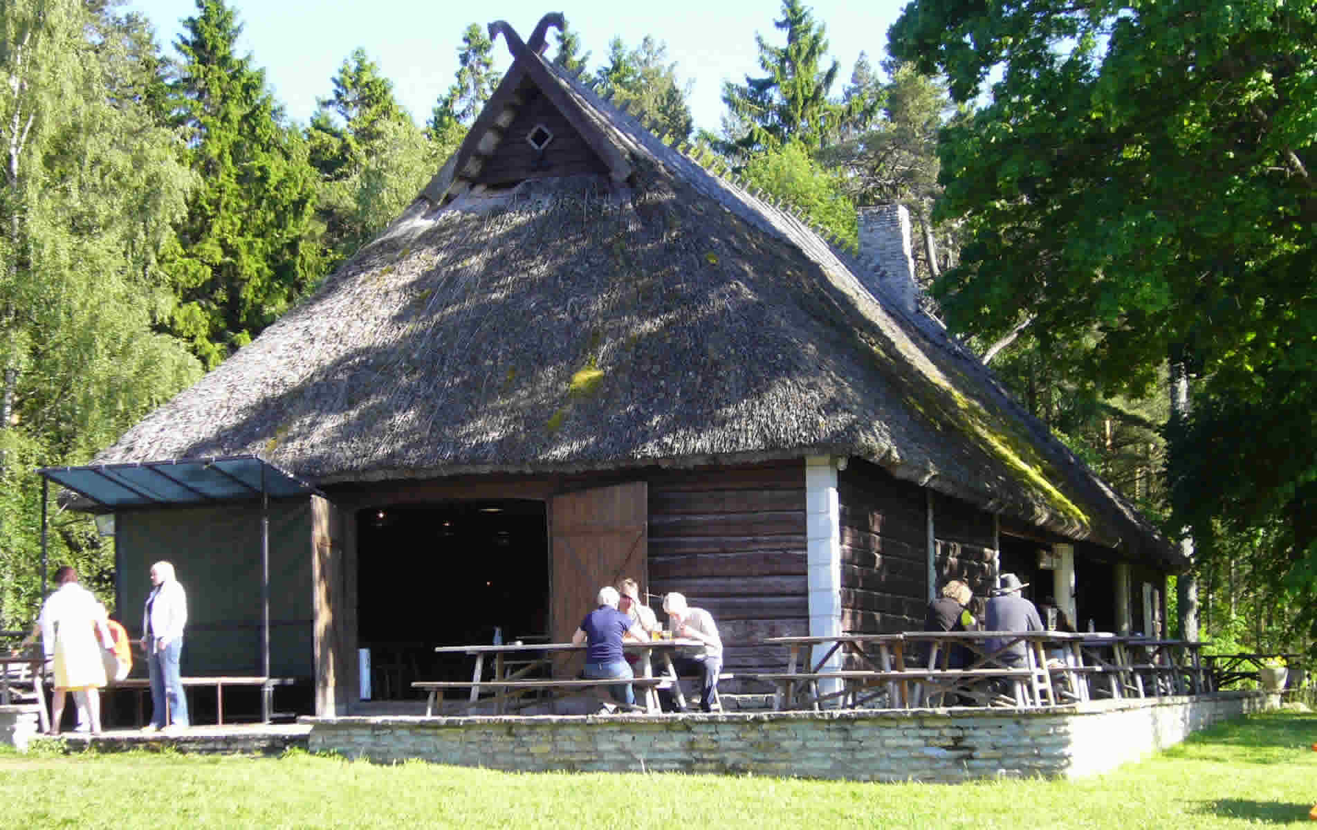 Taverne in Altja. Das historische Gebäude,das einst an der bedeutenden Landstraße Tallinn - Petersburg lag, strahlt eine ganz besondere Atmosphäre aus, in der wir uns in eine vergangene Zeit zurückversetzt fühlen.